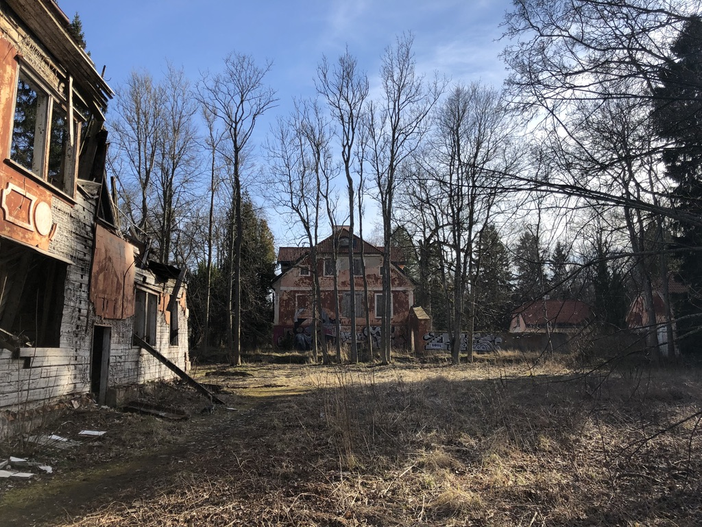 Kose suvemõisa hooned Pirita terviseraja ääres.